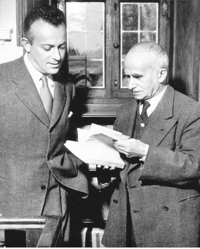 Luigi Einaudi, secondo Presidente della Repubblica, col figlio editore Giulio